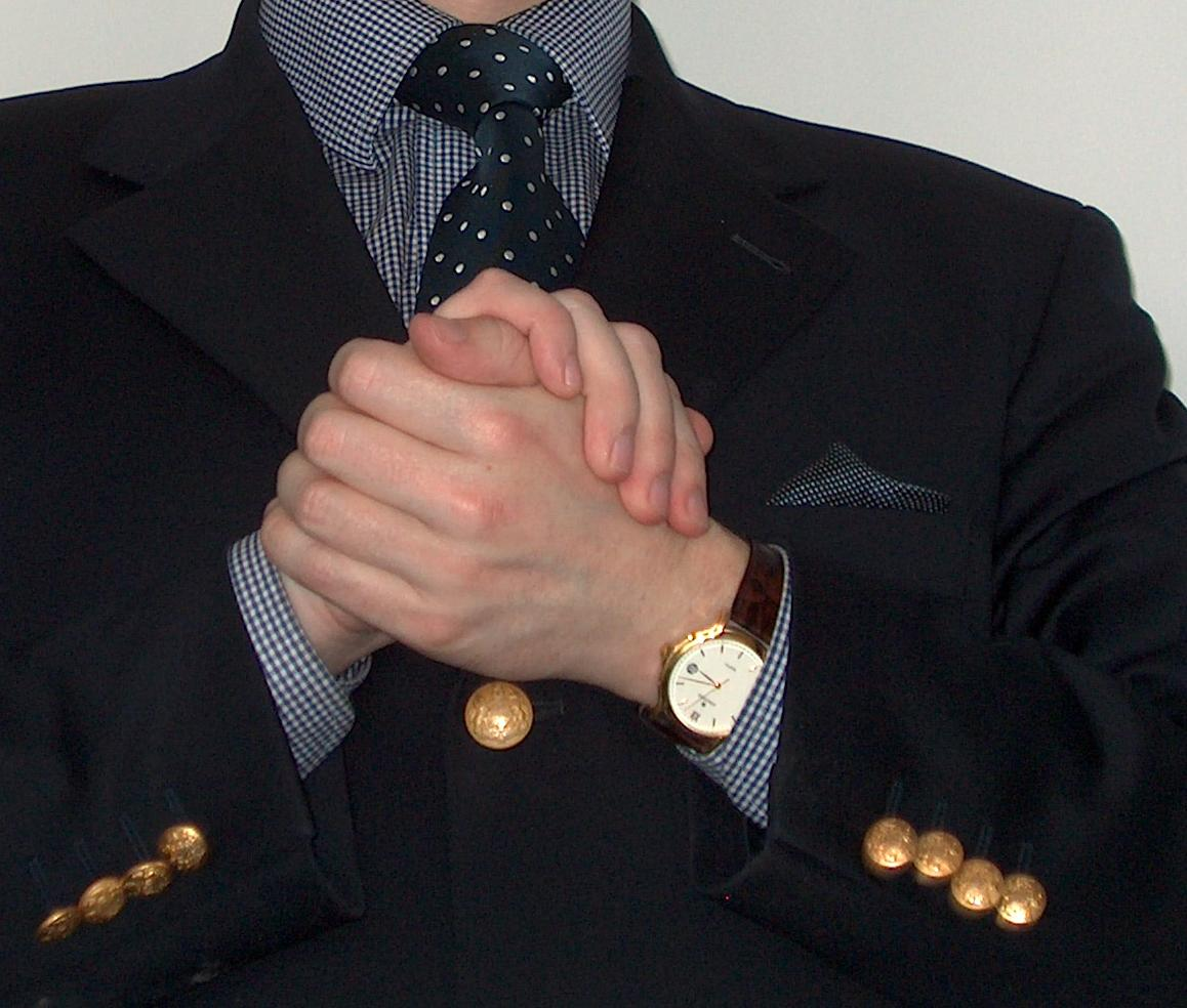 Einreihiger Blazer Foto von 2004 Fotograf: Benutzer:Dr._Meierhofer (Selbstauslöser/self-timer)